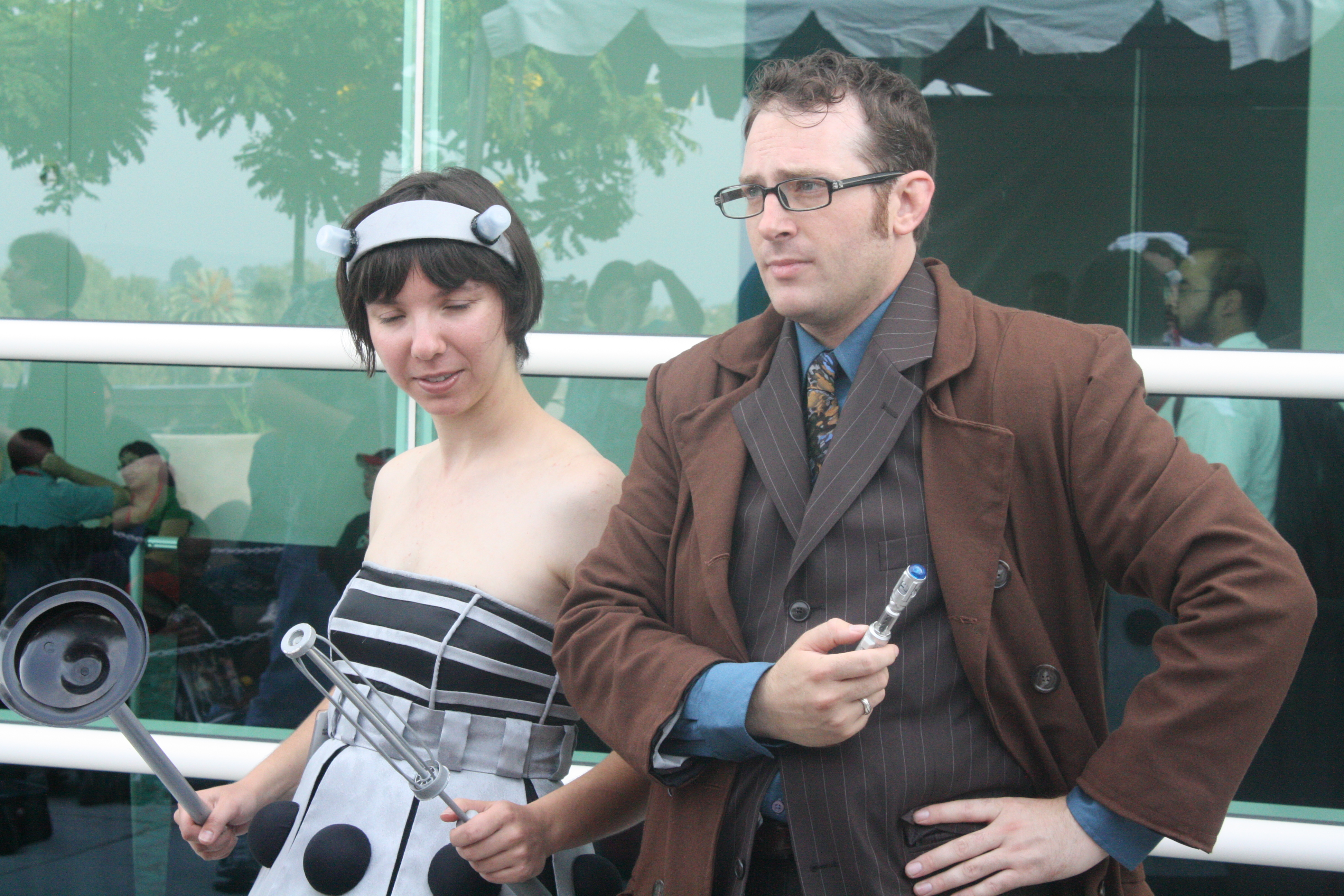 work it